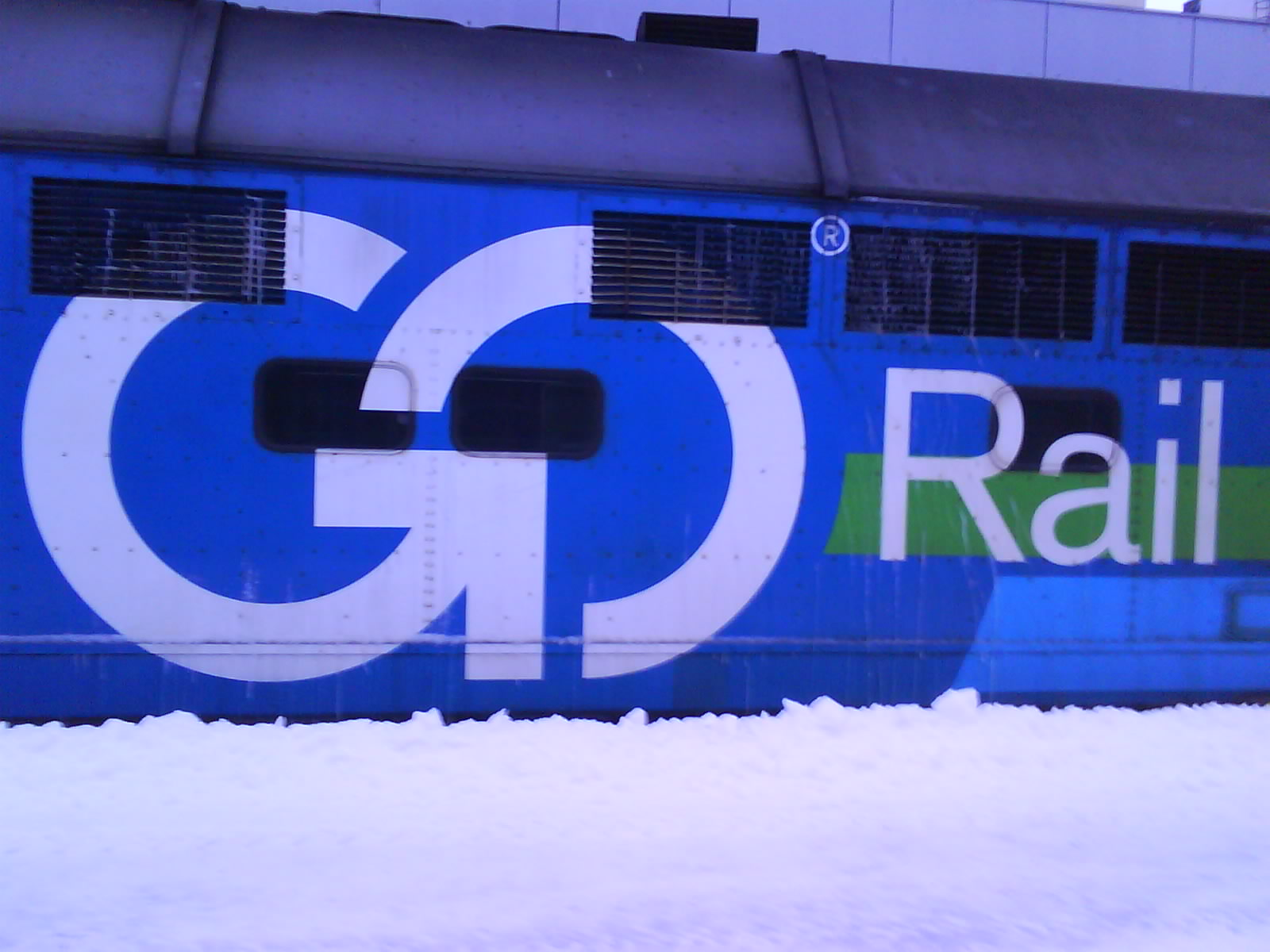 GoRaili logo